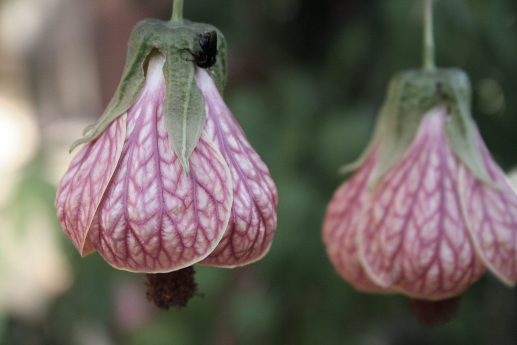 abutilon